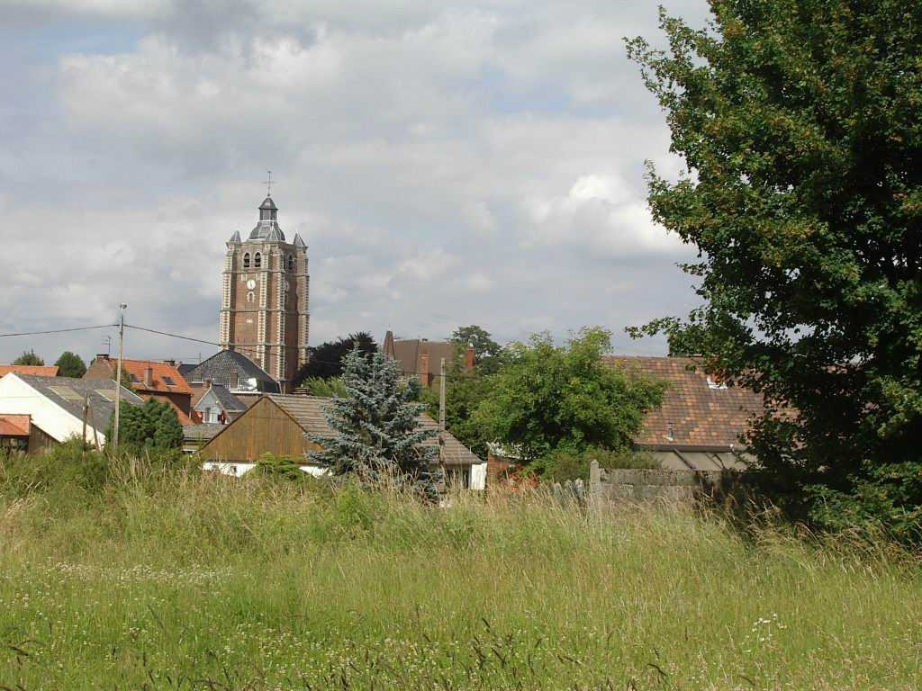 Village de Bersée